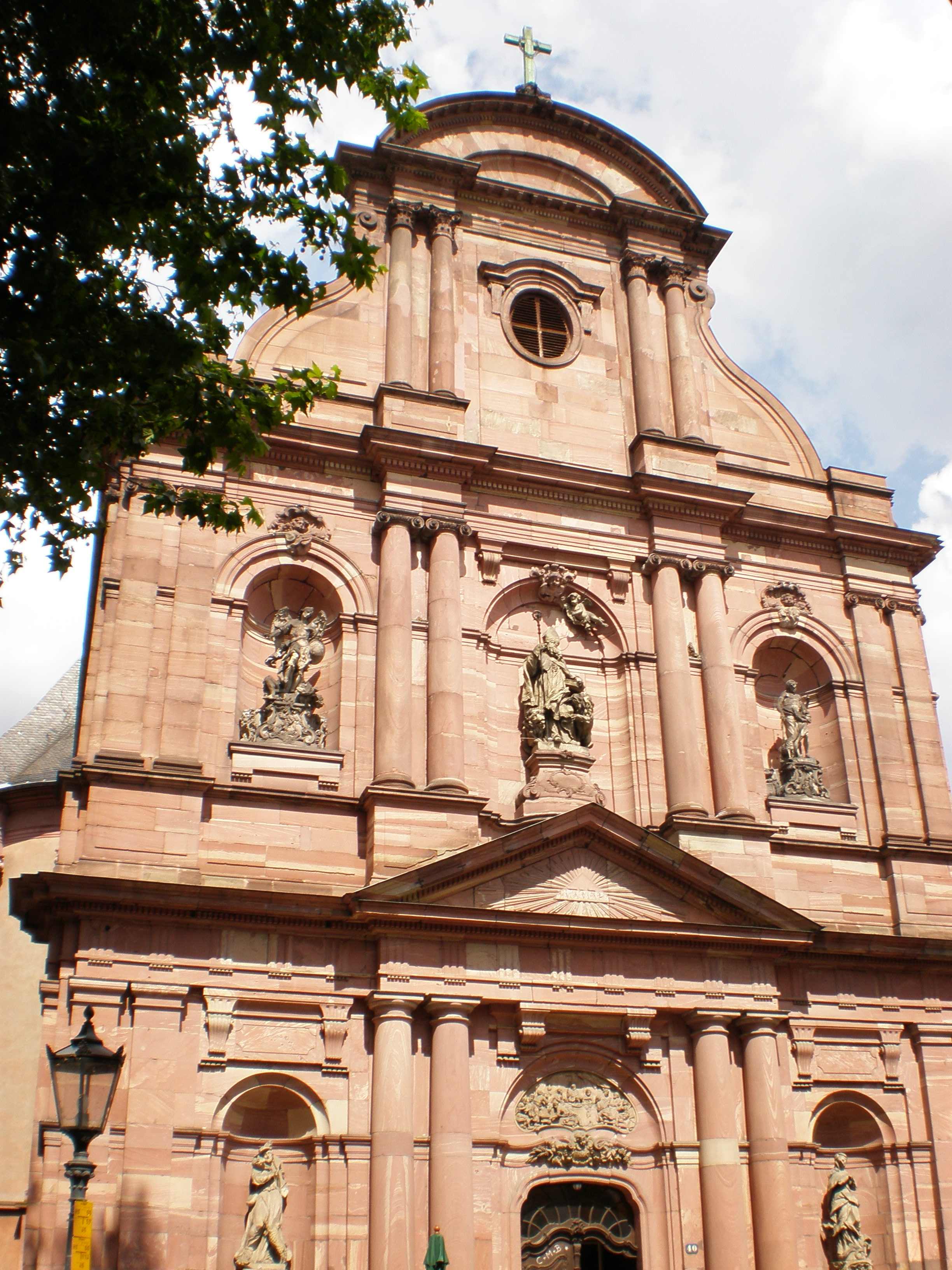 St. Ignaz Mainz, vor der Fassadenrenovierung